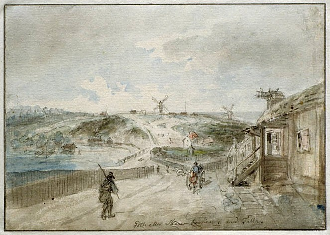 Götgatan med Skanstull i bakgrunden Akvarellerad. pennteckning av Elias Martin, från 1780-90-talet. Photograph taken 1995